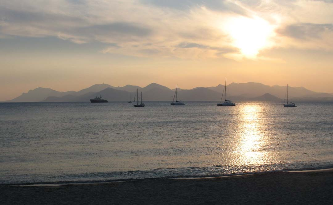 Massif de l'Estérel vu de Cannes